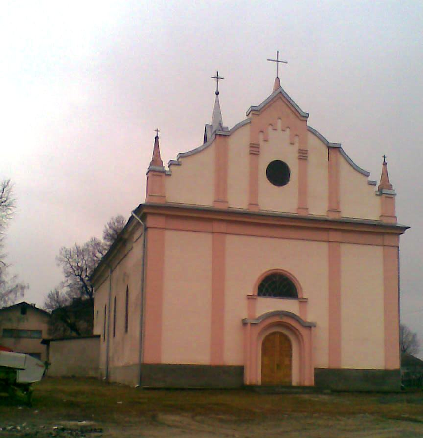 Костел. Озерна, Зборівський район